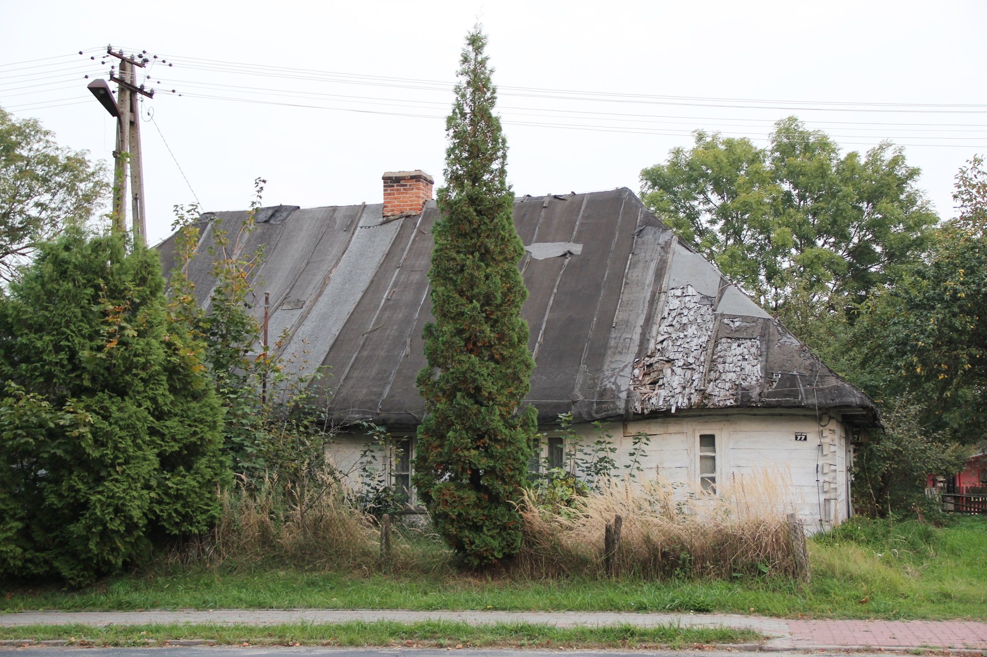 Stary Brus - czworak (nr 77), pocz. XIX